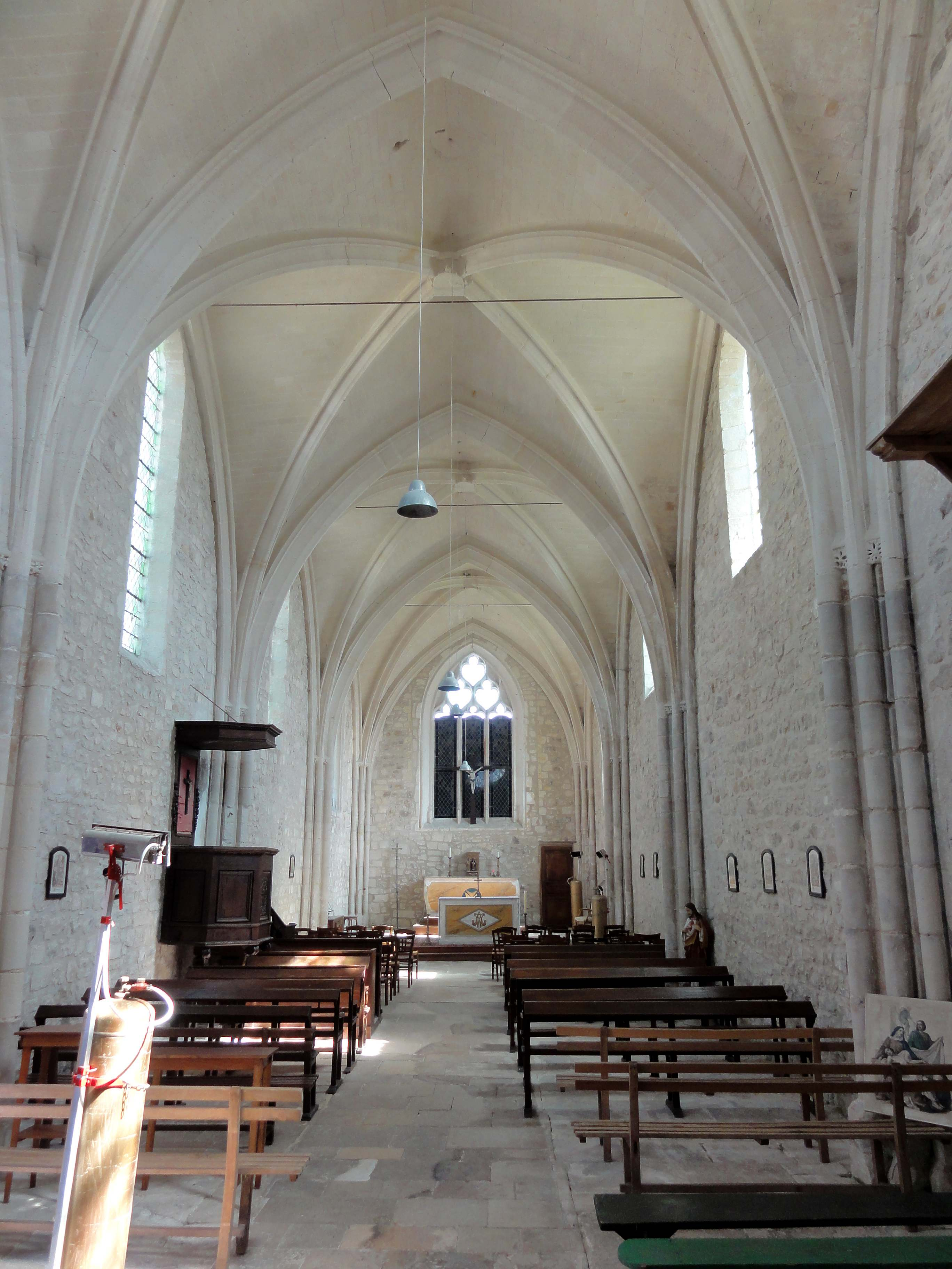 Intérieur de l'église (voir titre).